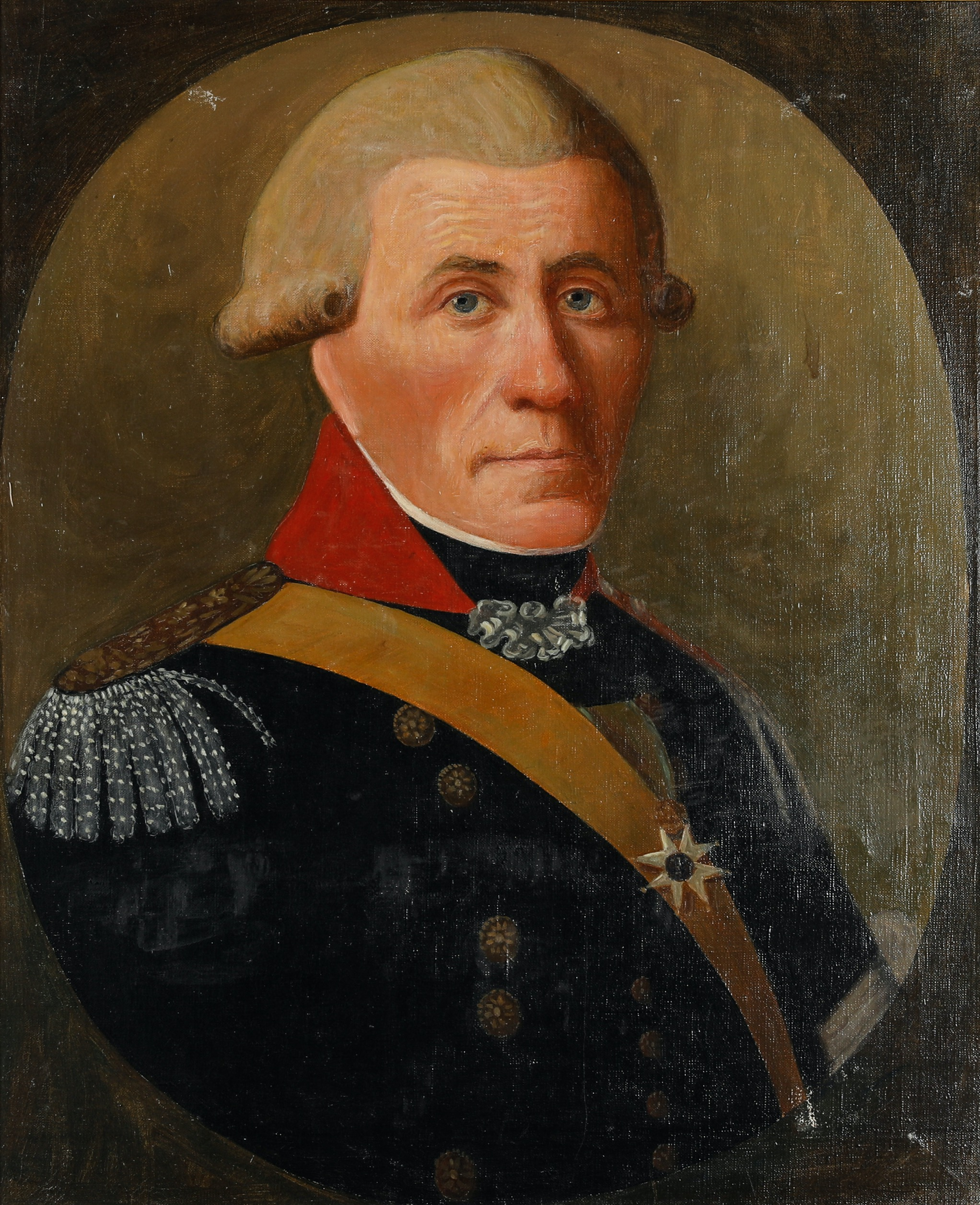 Major Carl Johan Jegerschöld (1740-1818) iklädd uniform m/1792 för Finska Artilleriregementet. På bröstet syns Serafimerorden.